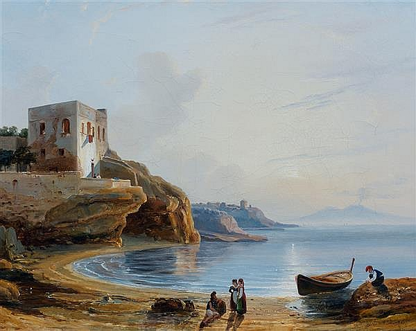 Gabriele Smargiassi, Paysage napolitain (1830), 30 x 40 cm, collection particulière. Vente Tajan, Paris, 16 décembre 2014.